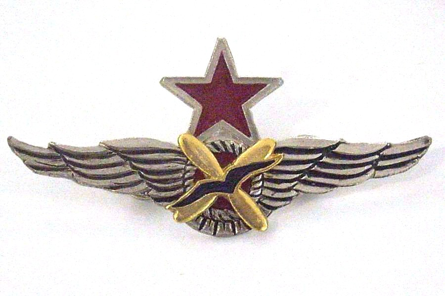 Emblema o 'alas' de piloto de caza de la Fuerza Aérea de la República Española durante la Guerra Civil Española 1936-1939